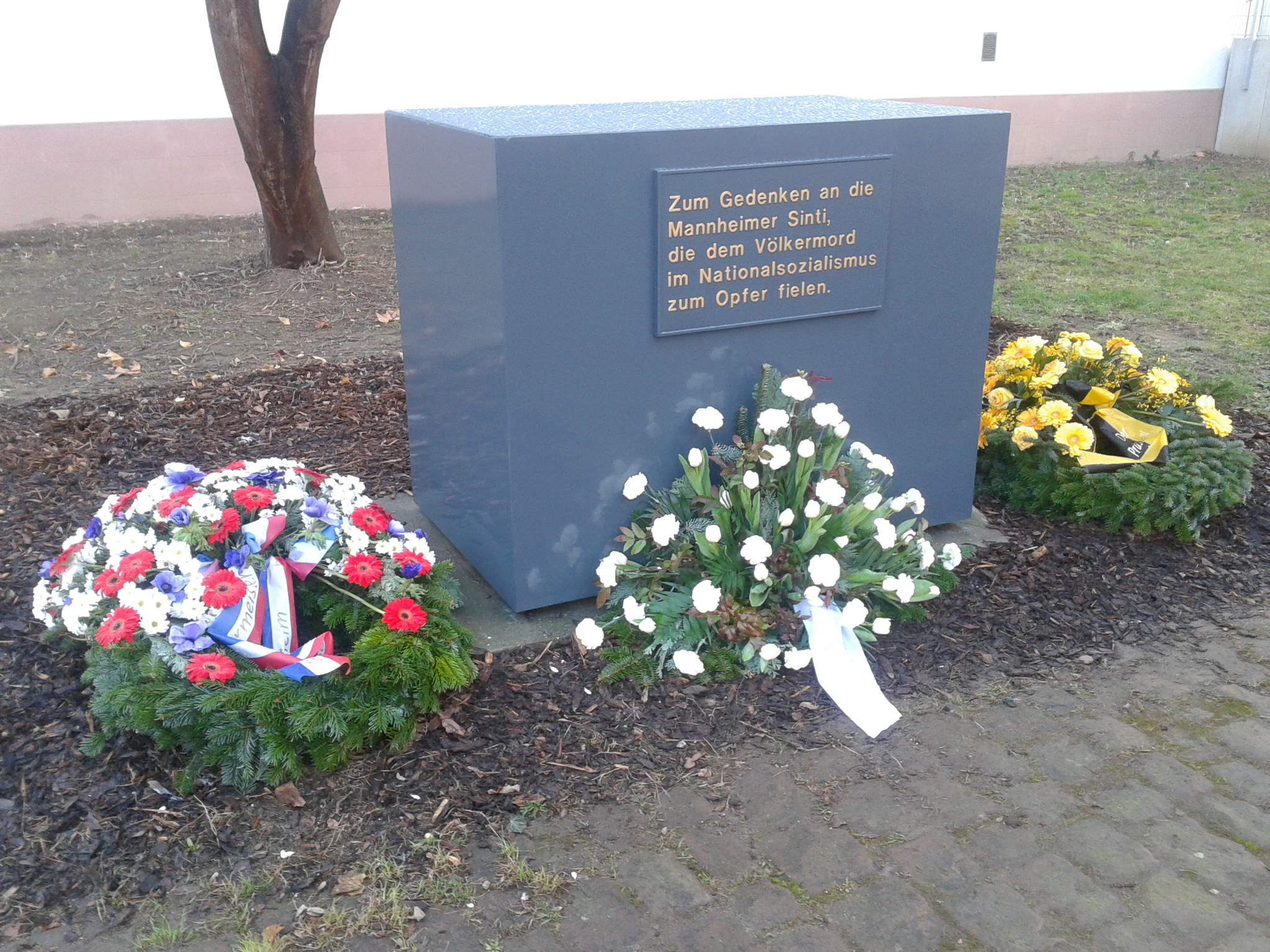 Kranzniederlegung bei der zentralen Feier des baden-württembergischen Landtags am Tag des Gedenkens an die Opfer des Nationalsozialismus am Sinti-Denkmal E6, Mannheim